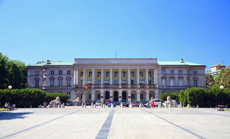 Warszawa (Polska)